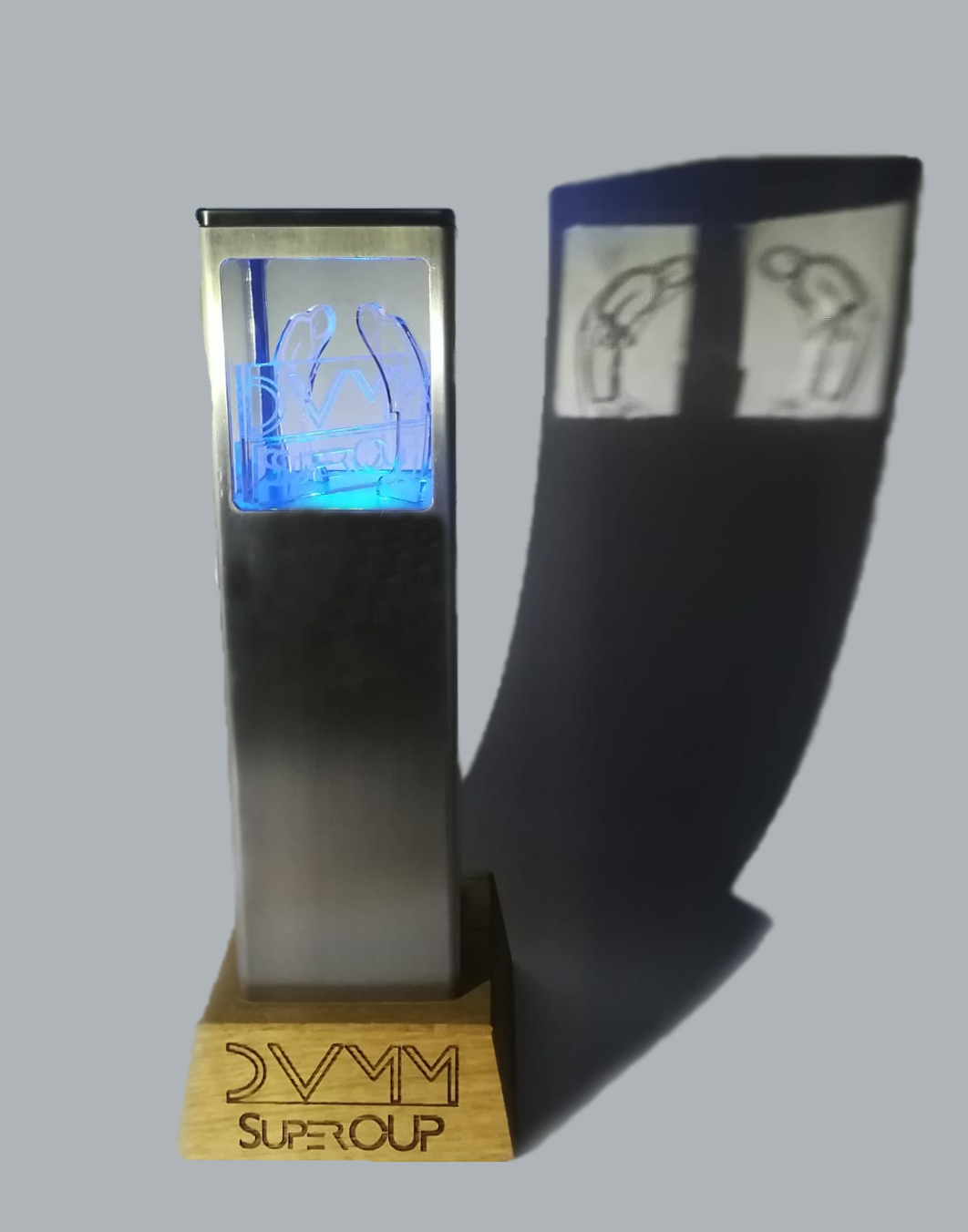 SuperCUP Wanderpokal mit Lichtspiel als Schatten